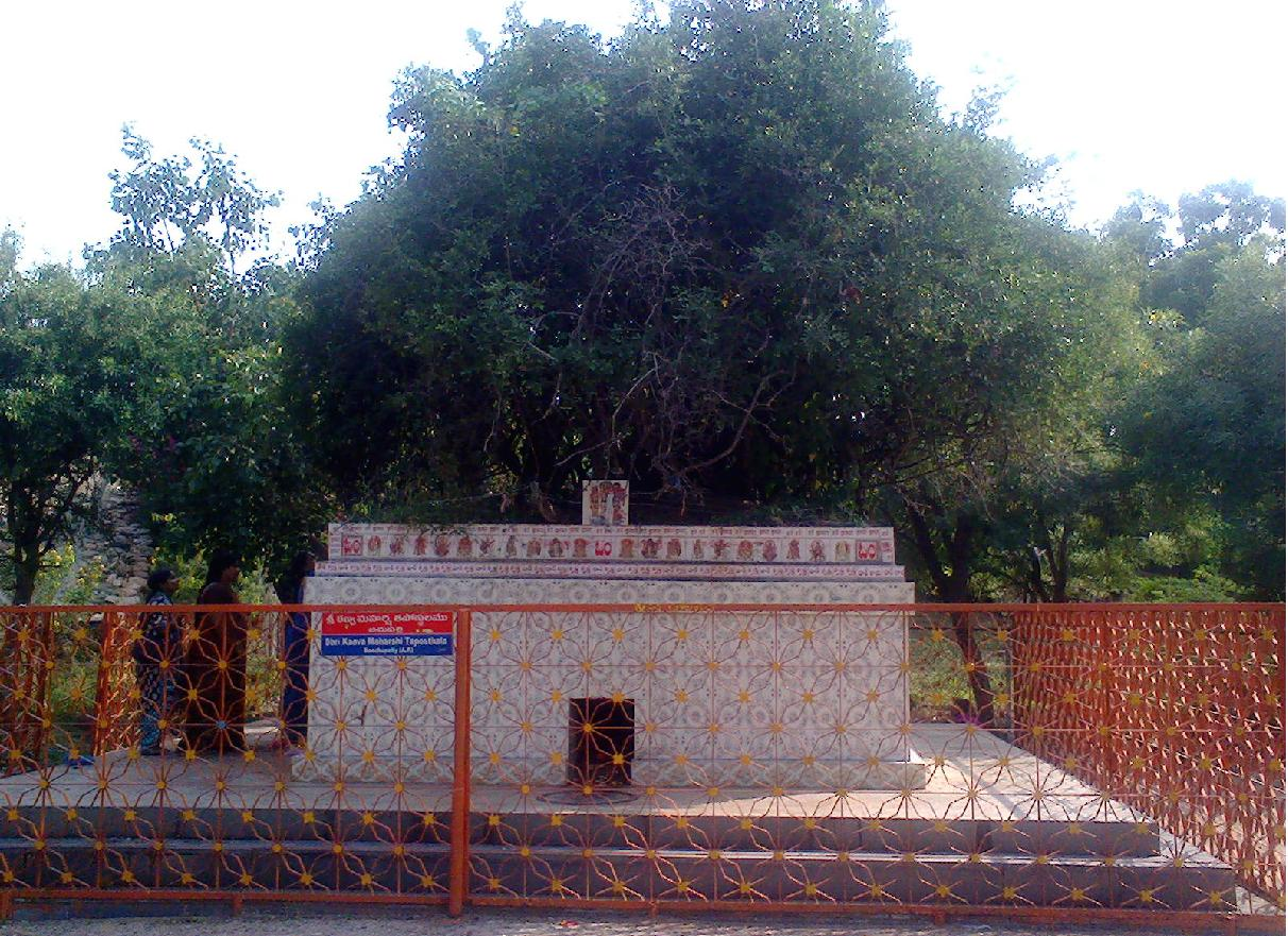 కణ్వమహార్షి తపోవనం